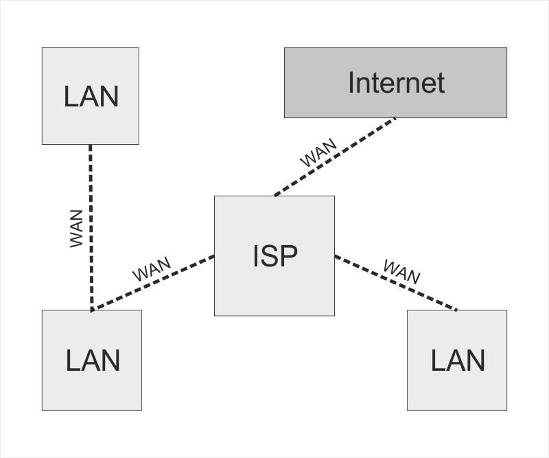 WAN hálózatok felépítése